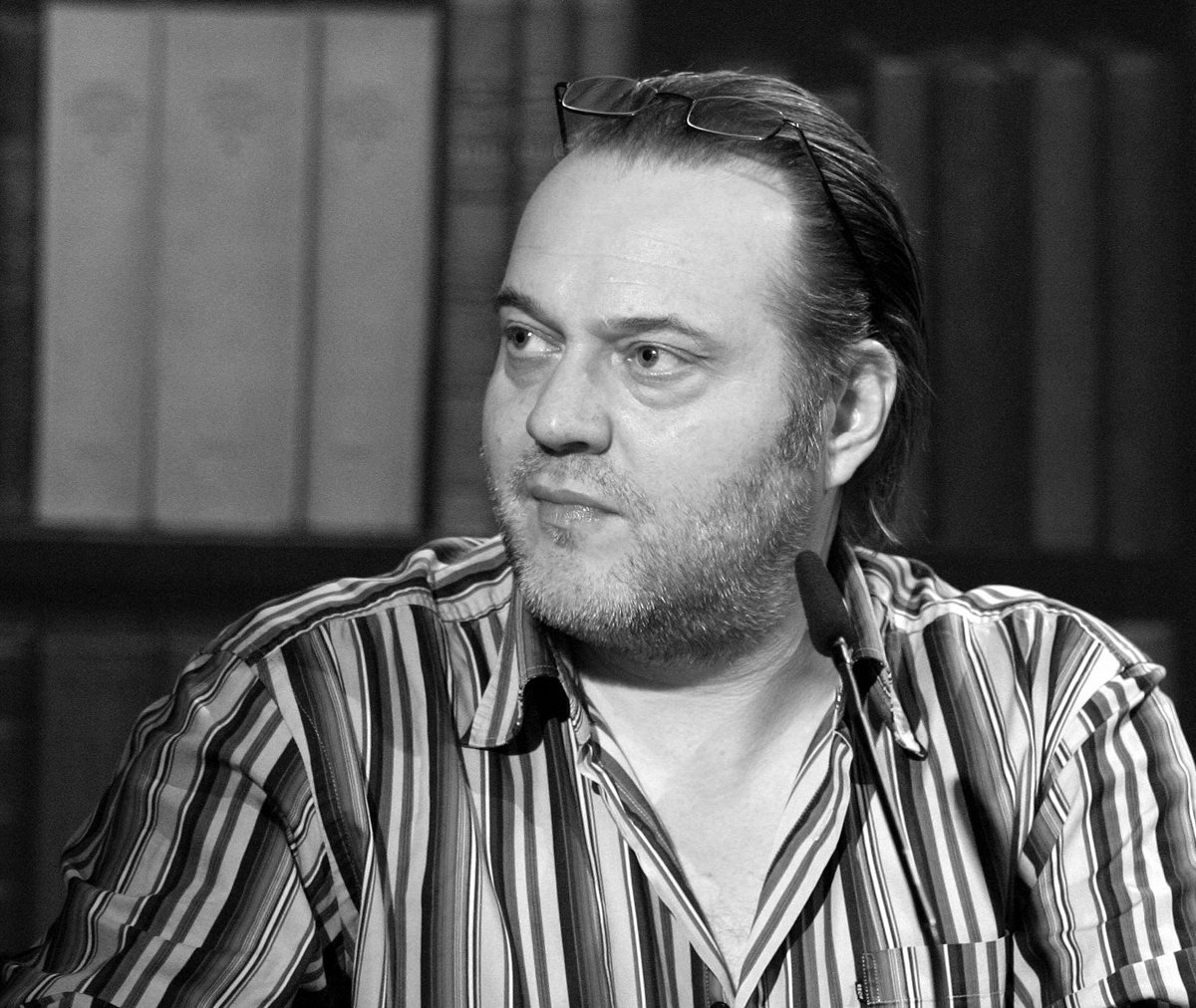 Jan Gregor Kremp auf dem WDR5-Literaturmarathon während der lit.Cologne 2008